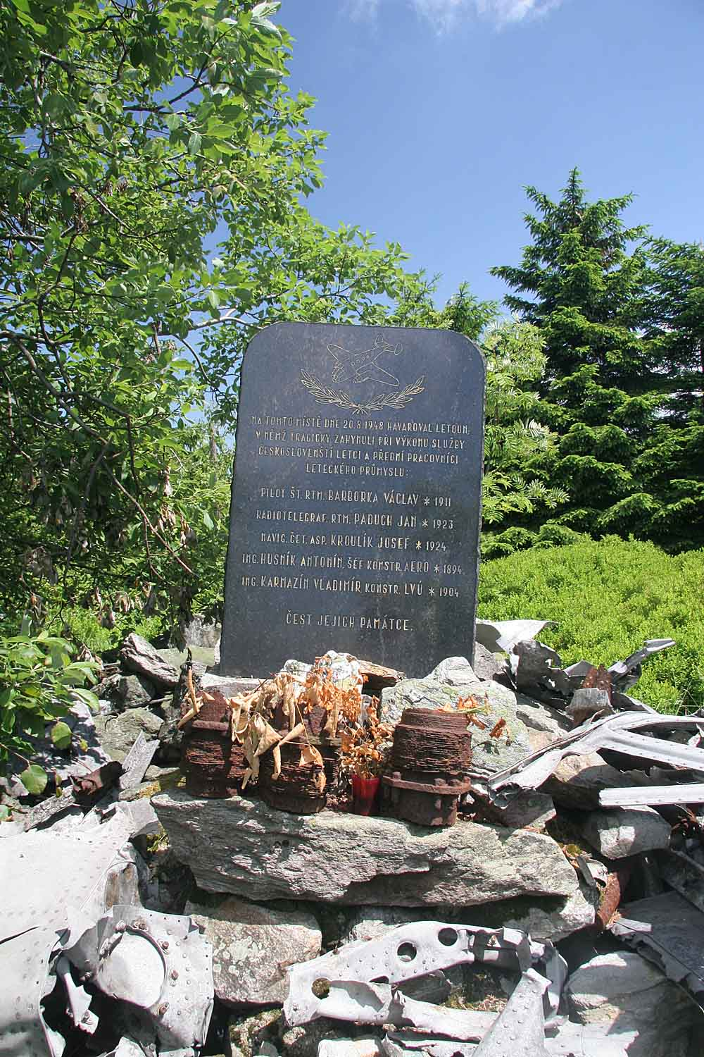 obrázek památníku Mohyla letců na úbočí Ještědu autor:Zp